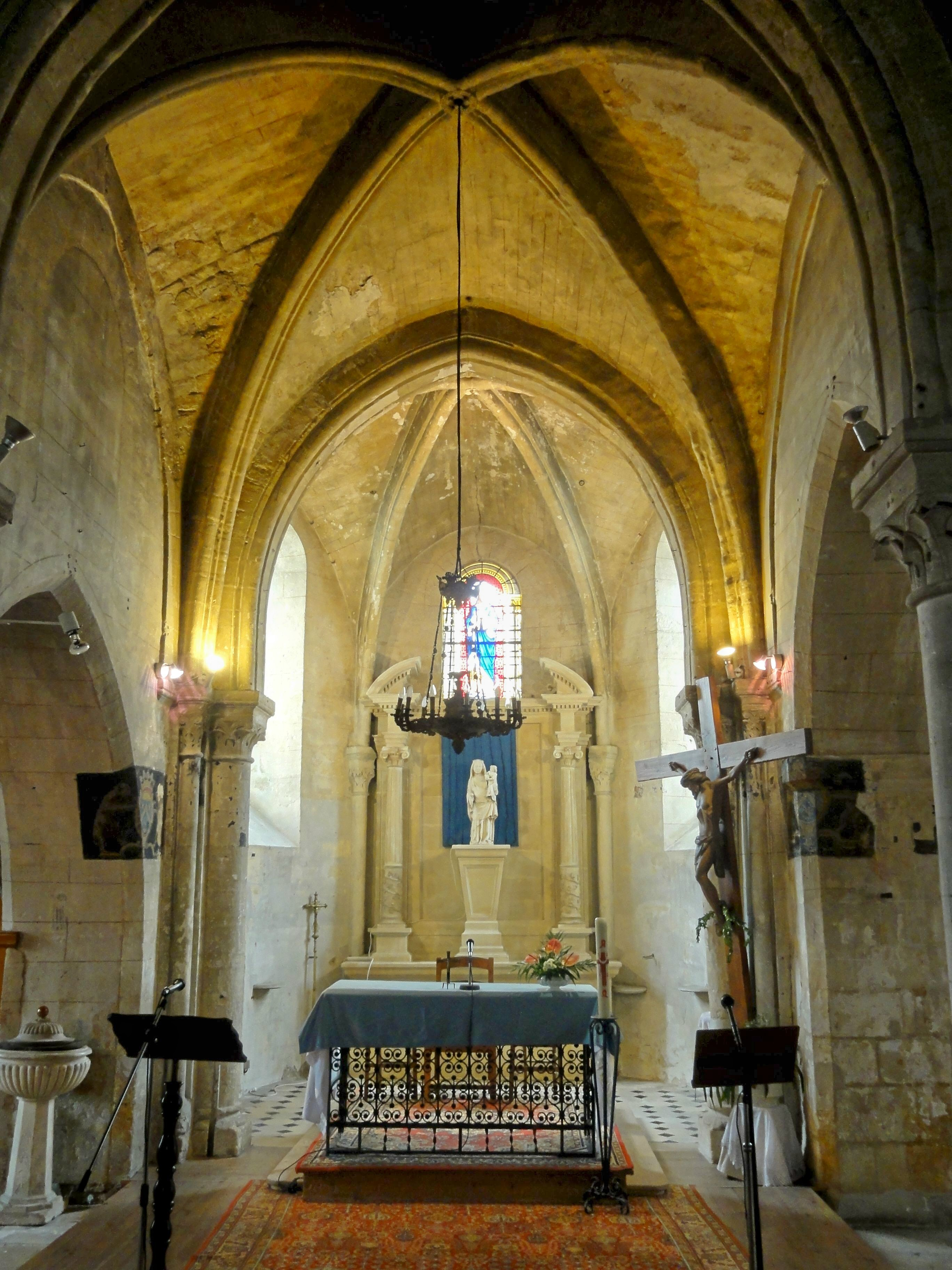 Chœur.